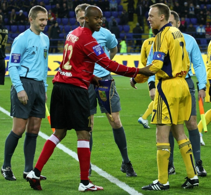 Жуниор Годой и Сергей Валяев.